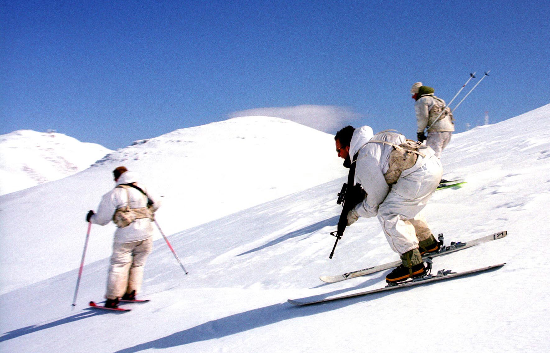 February 28, 2004. On warm days such as these, the Alpine Unit, the snow clearing and rescue unit of the Hermon, practices skiing, climbing, shooting, and rescue drills in snow covered regions. The unit is comprised of reserve soldiers who were formerly part of other elite units and who volunteered to serve. בימים חמימים אלו, לאחר סופת שלגים בחרמון, מקיימת יחידת האלפיניסטים, יחידת פינוי השלגים והחילוץ בחרמון, אימוני גלישה, טיפוס, ירי וחילוץ ברמות המושלגות. היחידה מורכבת מאנשי מילואים מתנדבים, יוצאי סיירות.